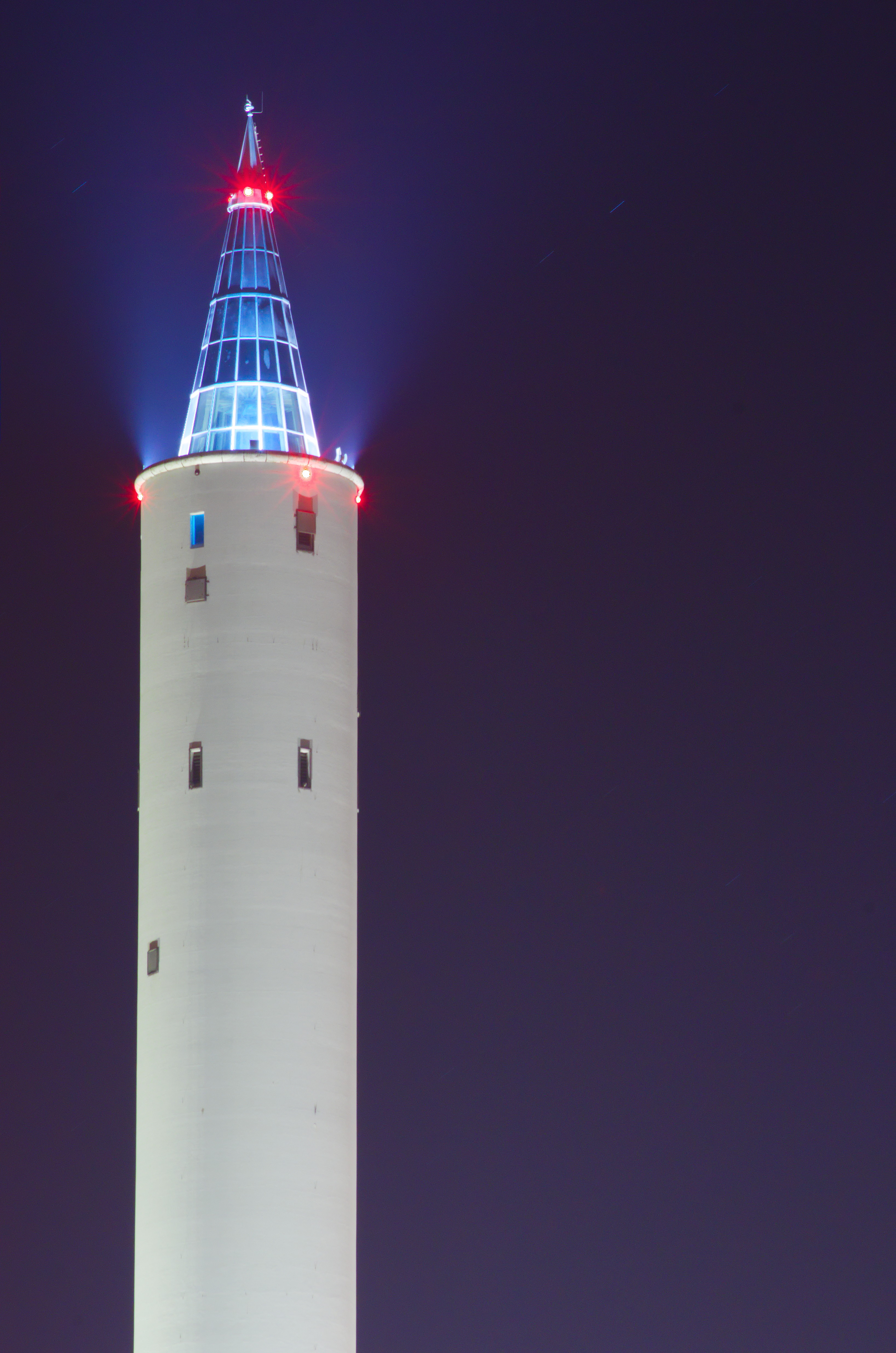 Fallturm Bremen - Turmspitze bei Nacht